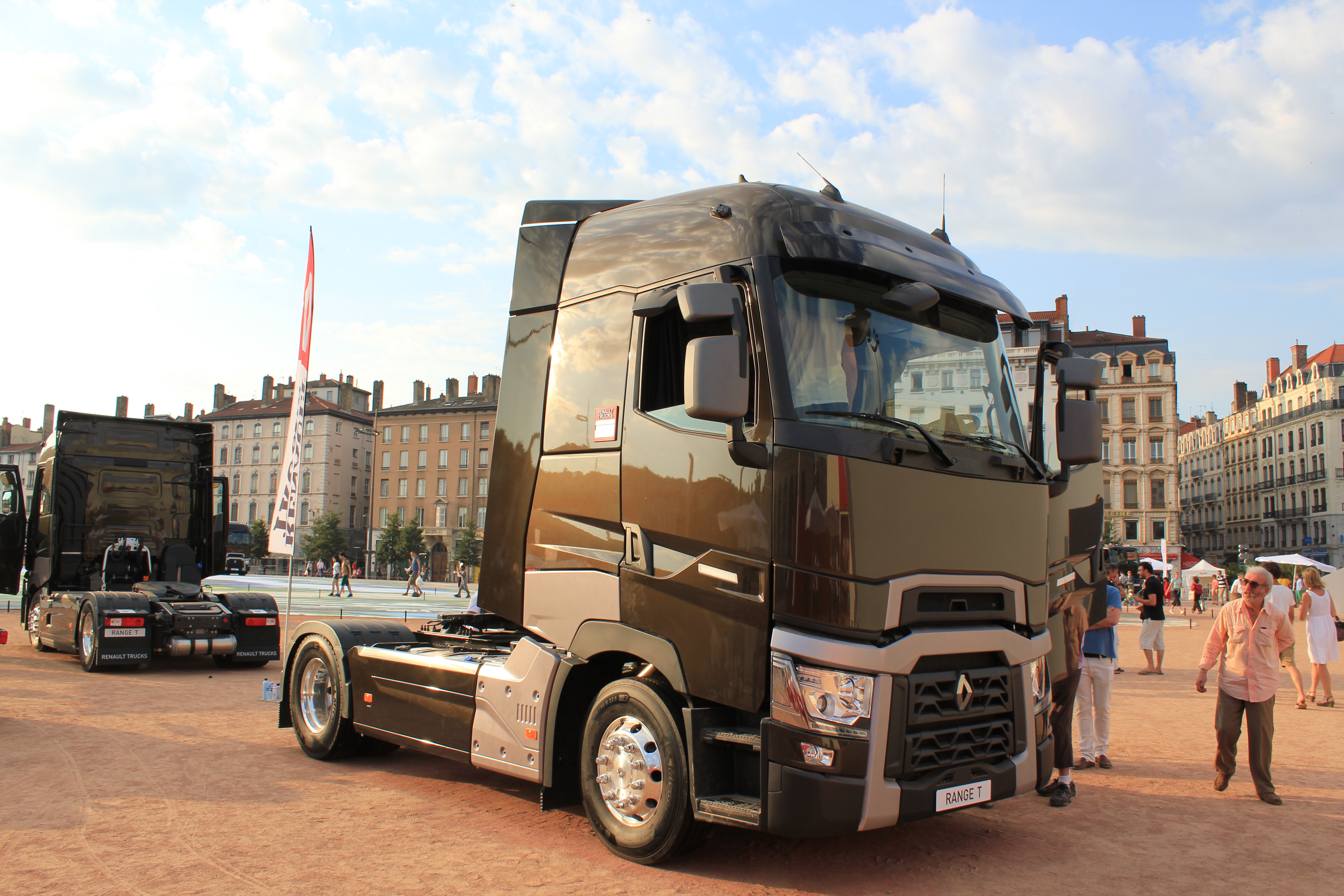 Le nouveau Renault T est exposé lors de la manifestation « Truck de Ouf » à Lyon, Place Bellecour.